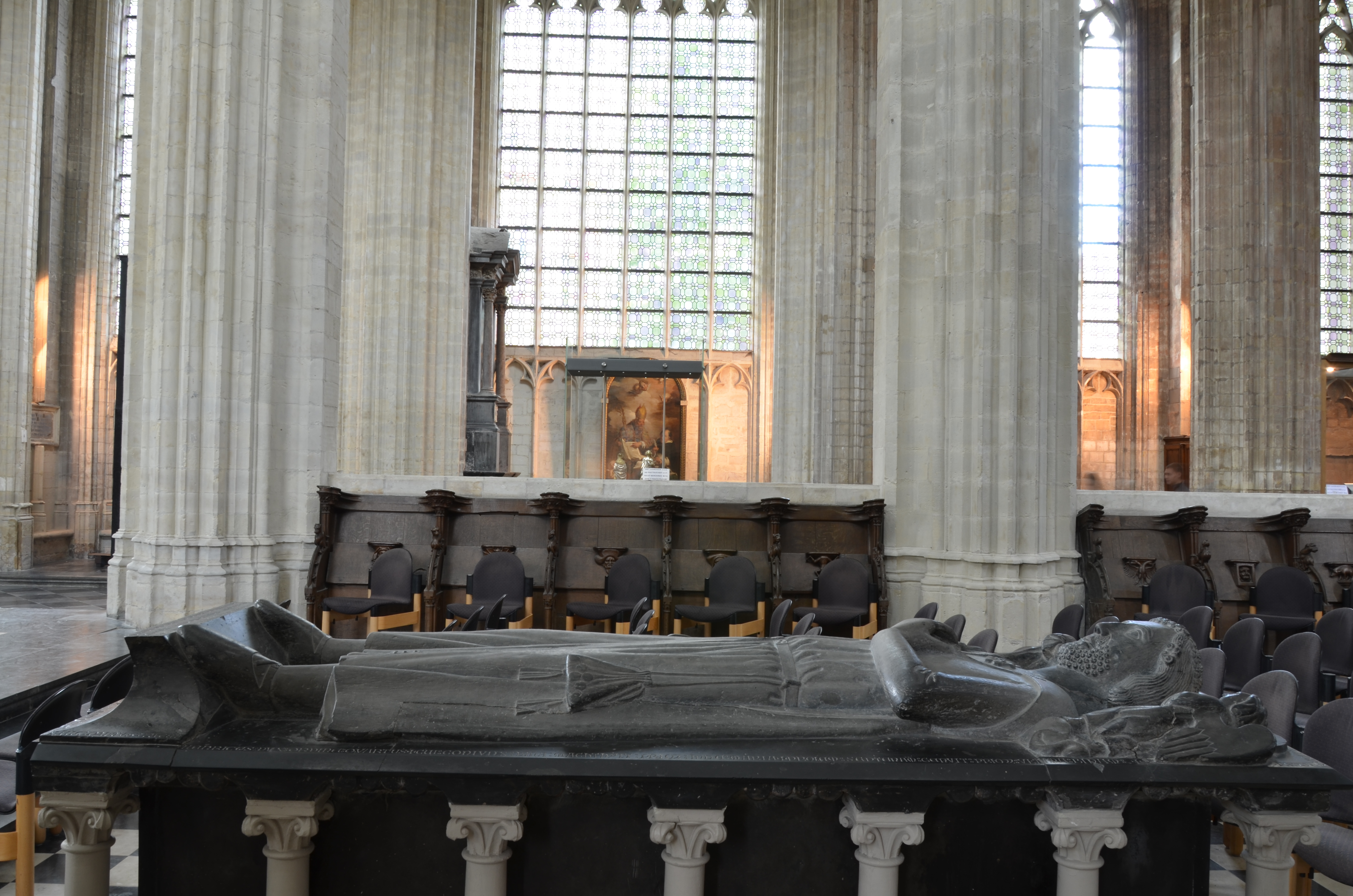 Sint-Pieterskerk Graftombe van Hendrik I van Brabant